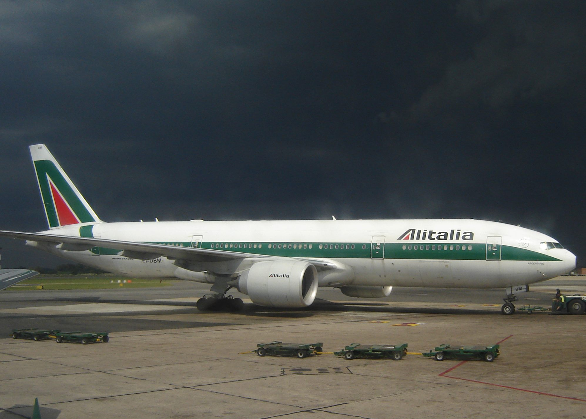 Boenig 777-200 EI-DBM da Alitalia Local: Ezeiza airport, Argentine